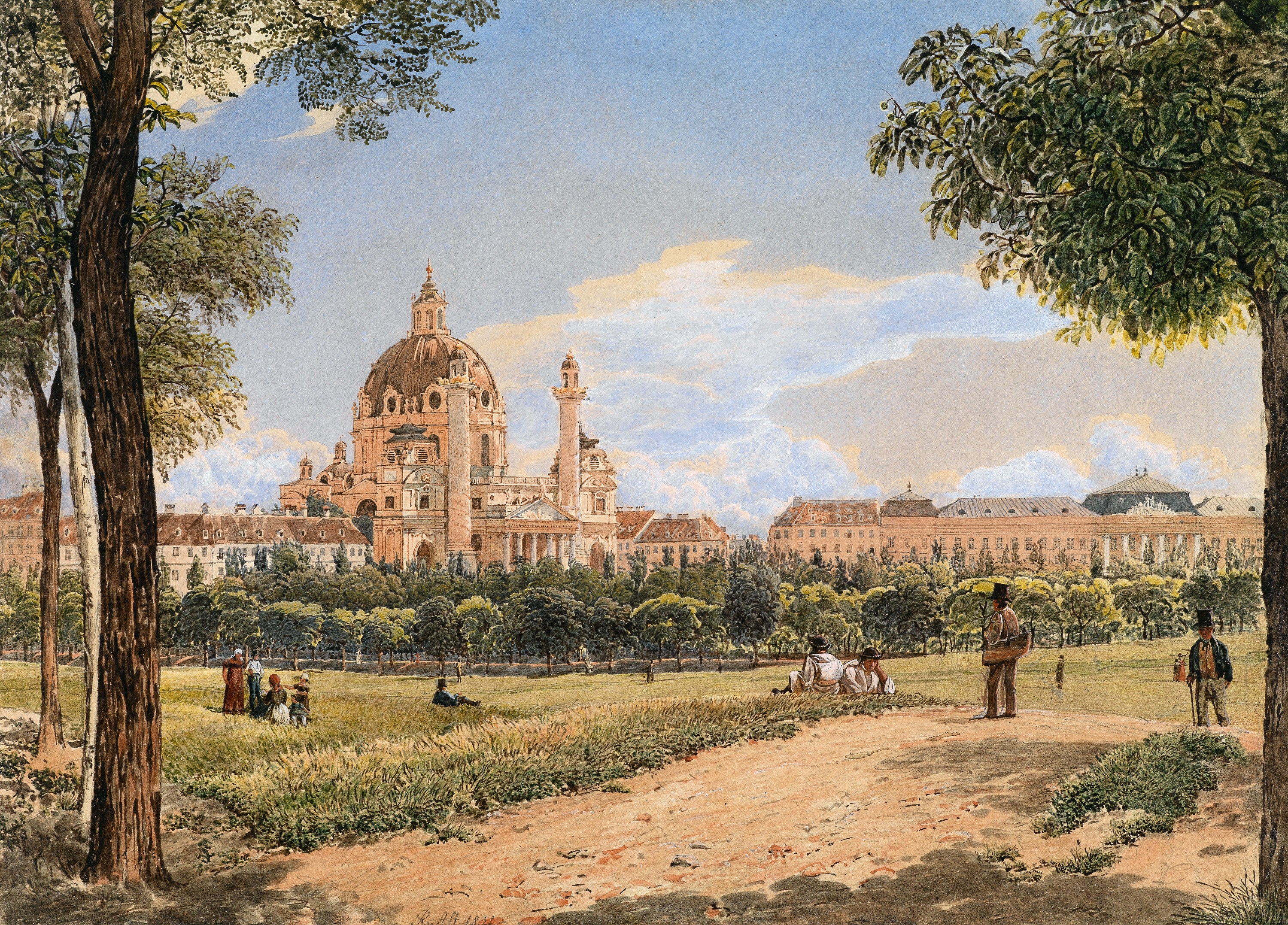 Blick auf die Karlskirche und das Polytechnische Institut. Aquarell.